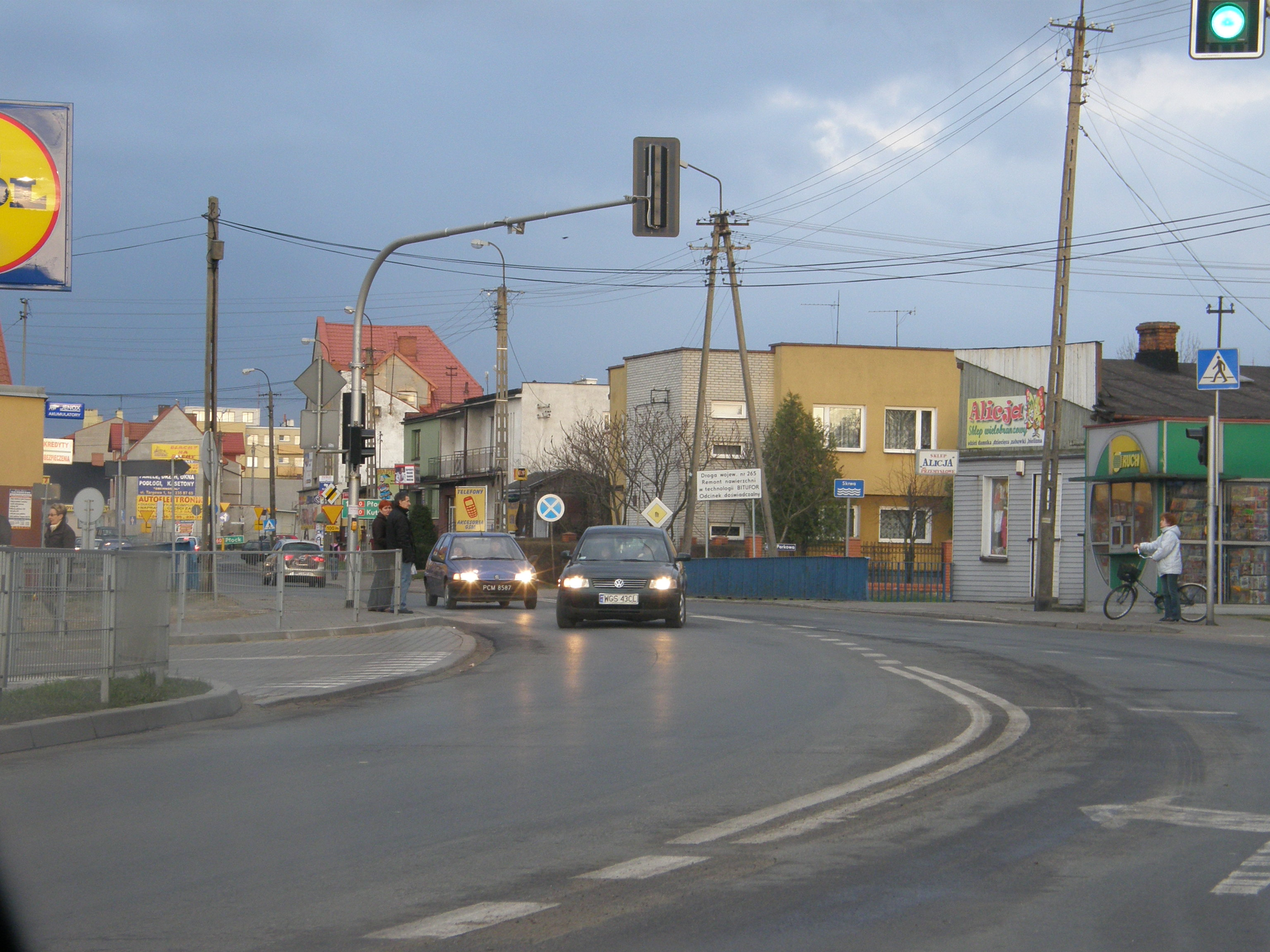 DW 265